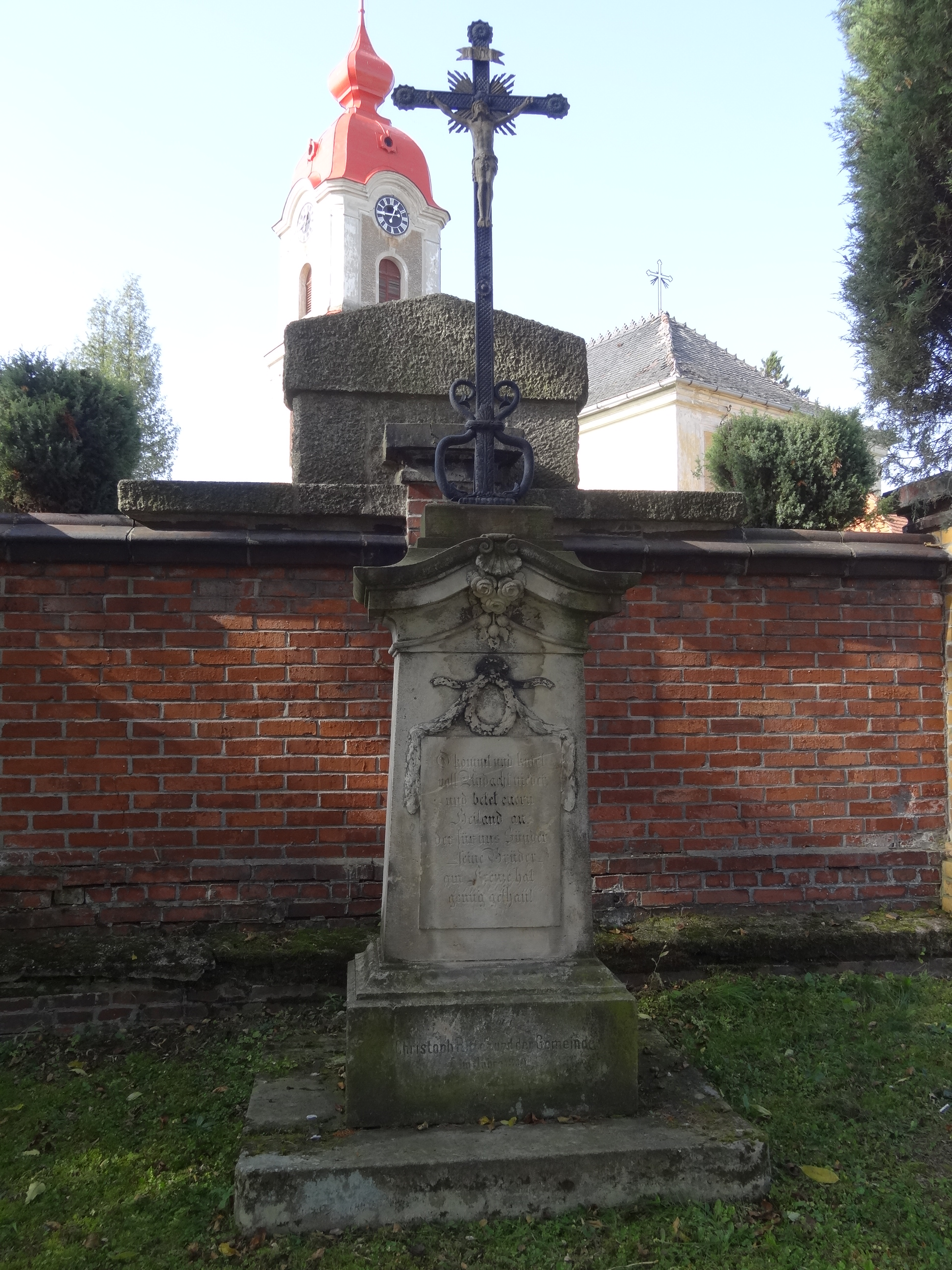 Krucifix, u vstupu na hřbitov, Kunratice (okres Liberec).